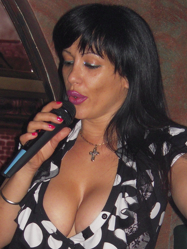 Весна Вукелић Венди (Vesna Vukelić Vendi)